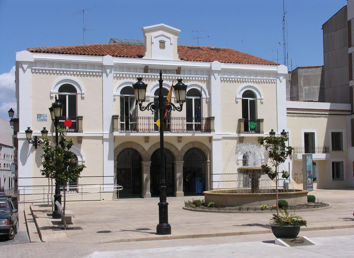 Ayuntamiento de Navalmoral de la Mata (prov. Cáceres)